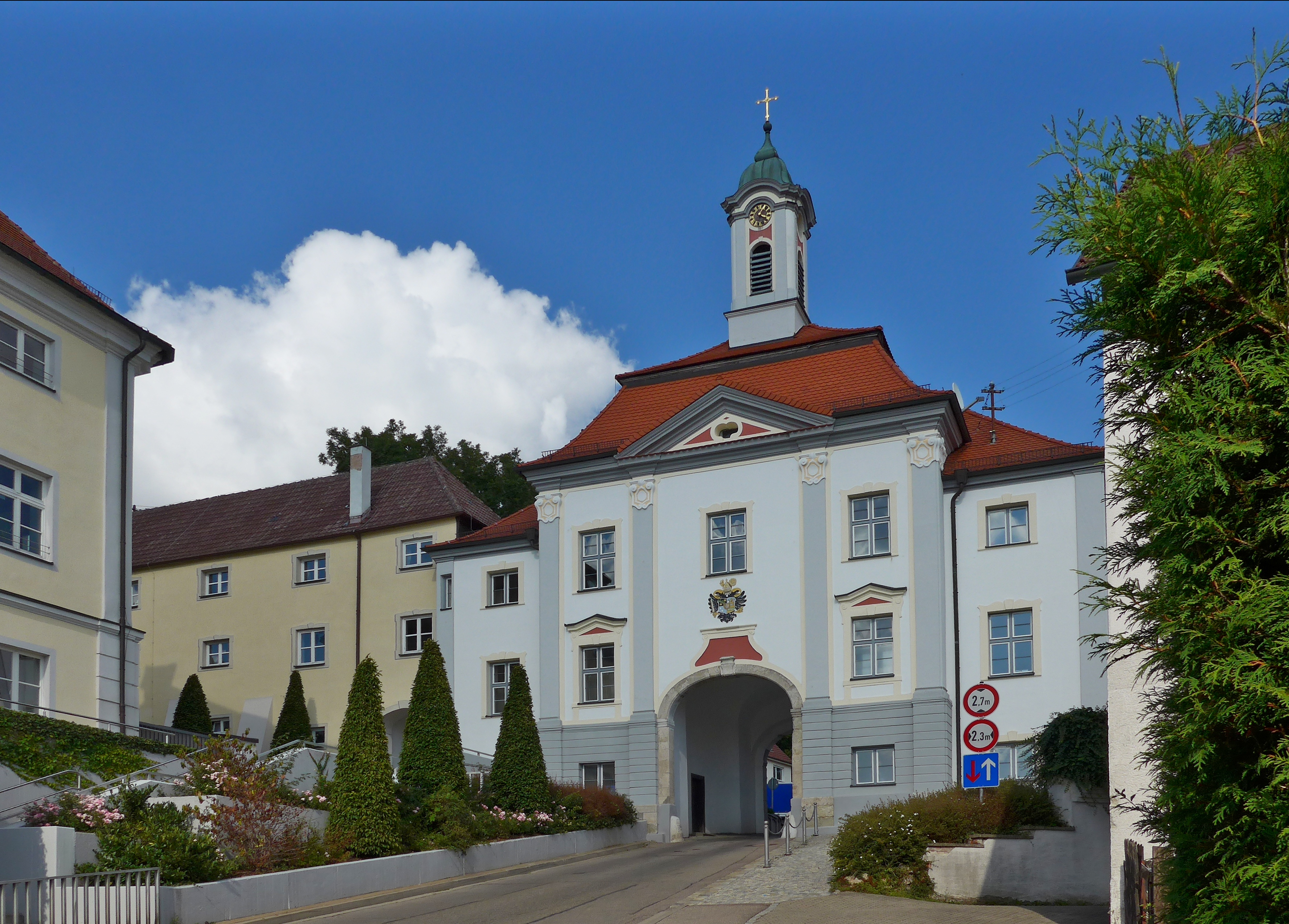 Ansicht von WestenThis is a photograph of an architectural monument.